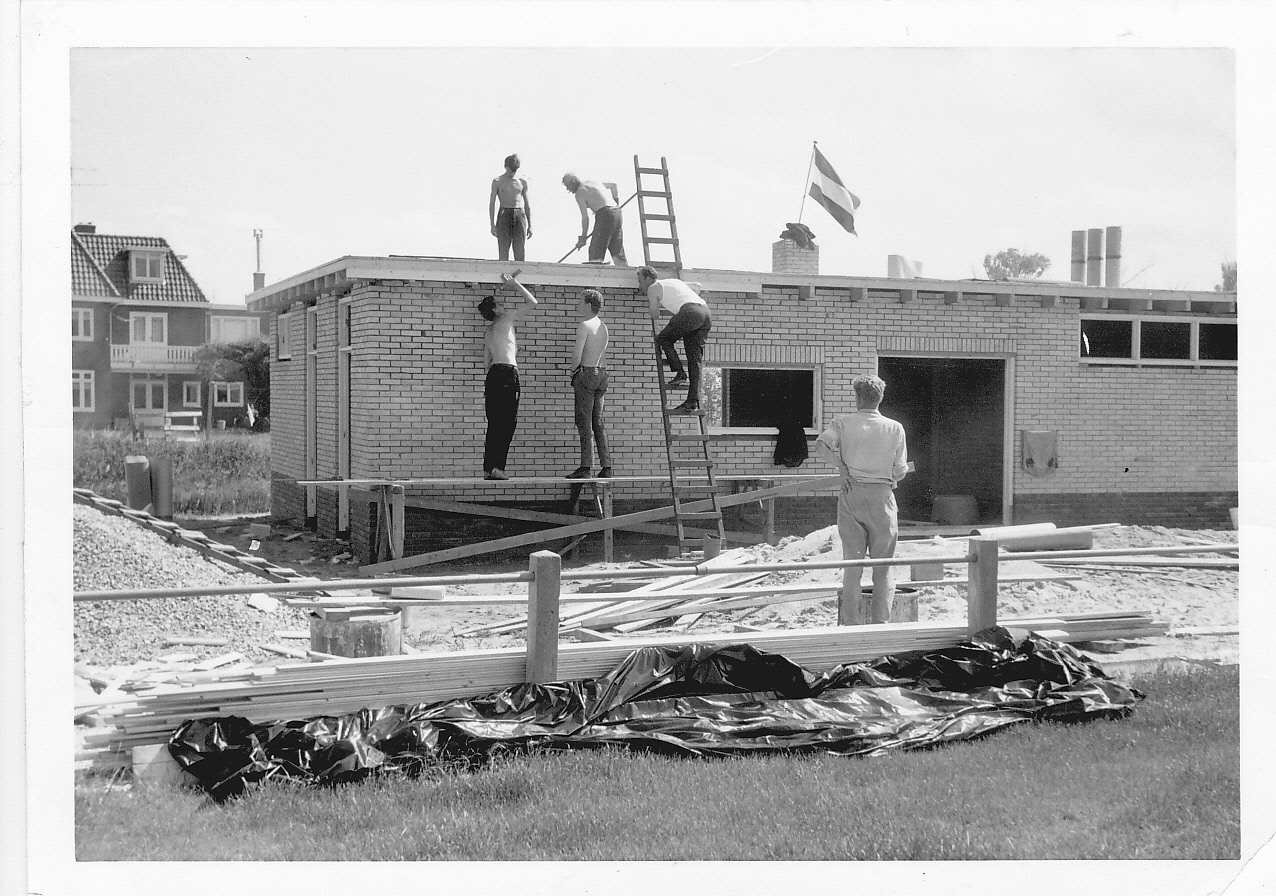 Bouw kantine en kleedkamers Duinranders 1966